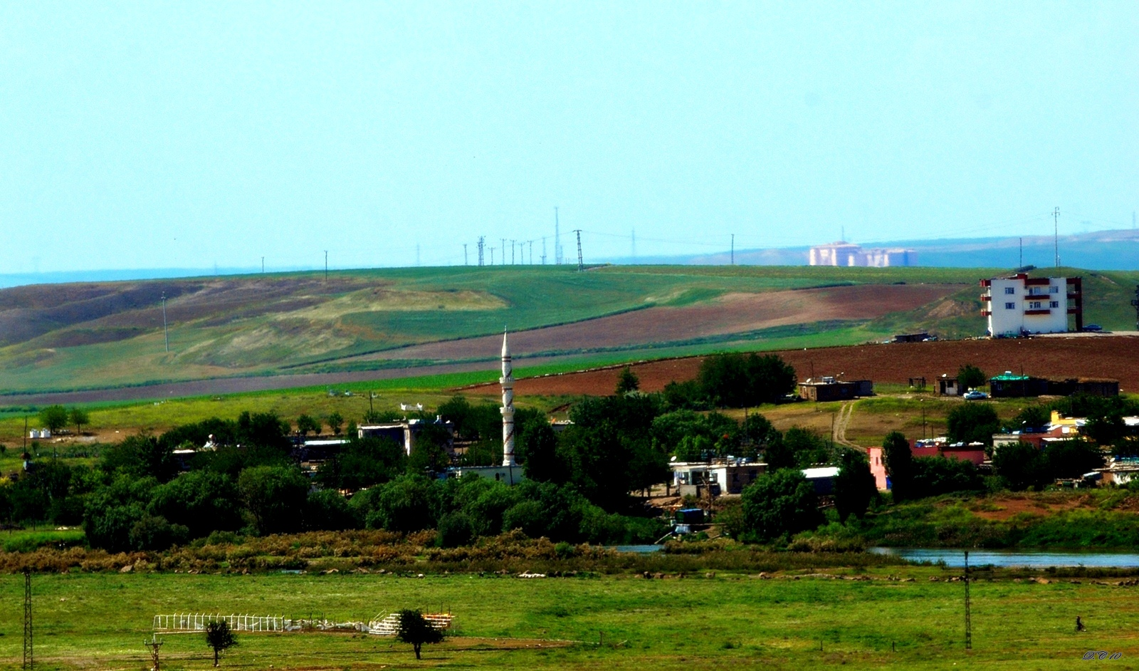 Kurdî: Ji Girê Şêx Miheme bi lensa Sîgma 50-500mm û Nîkon d80 hatiye kişandin.